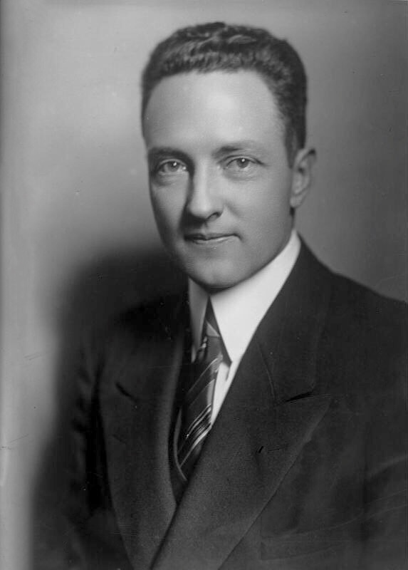 Der berühmte Polarflieger Commander Richard E. Byrd wurde infolge seiner grossen Verdienste um die Erforschung des Südpols zum Vizeadmiral der amerikanischen Marine ernannt.